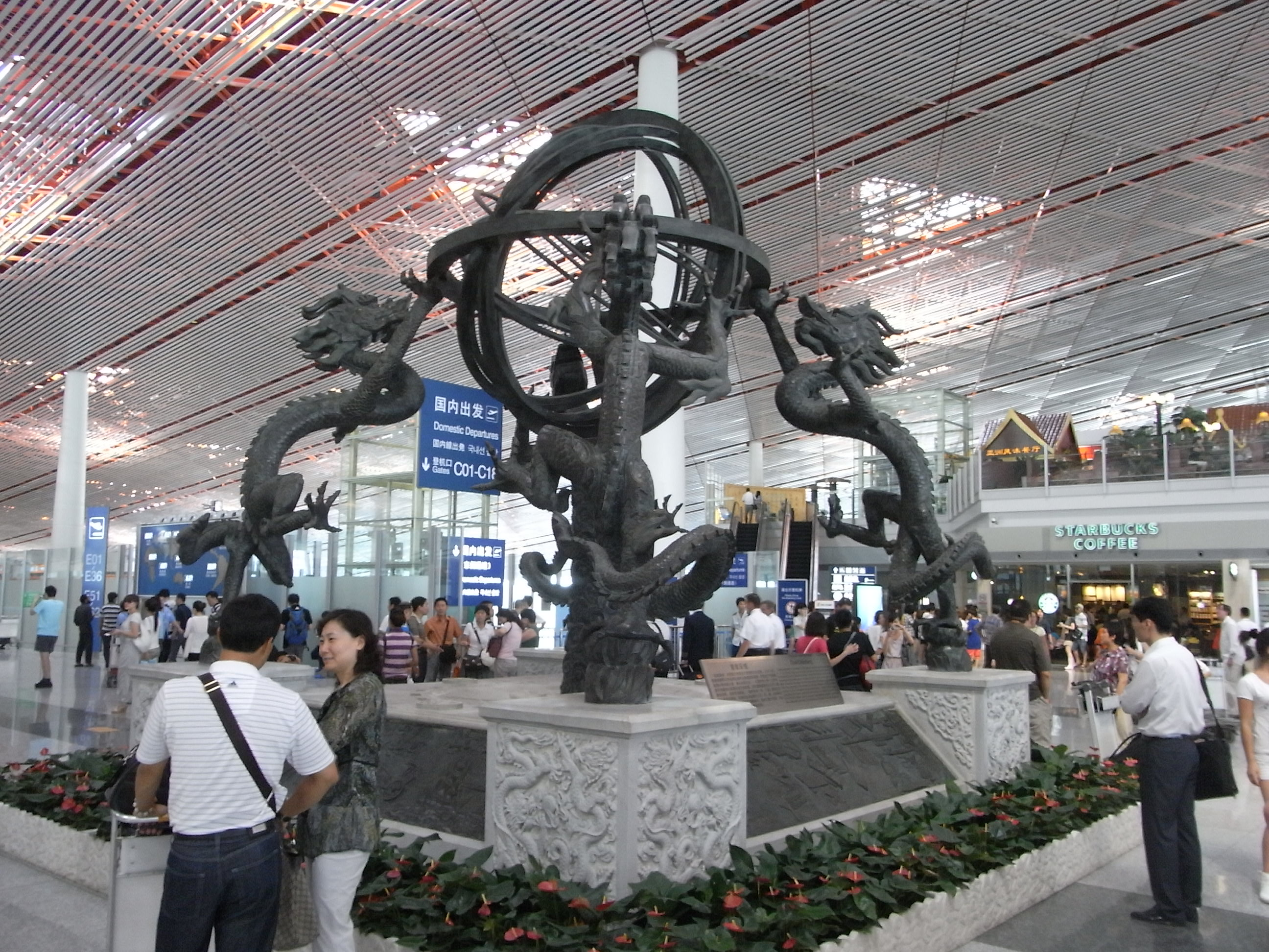 zh:2010年zh:8月北京 北京首都國際機場 內景 & 渾儀